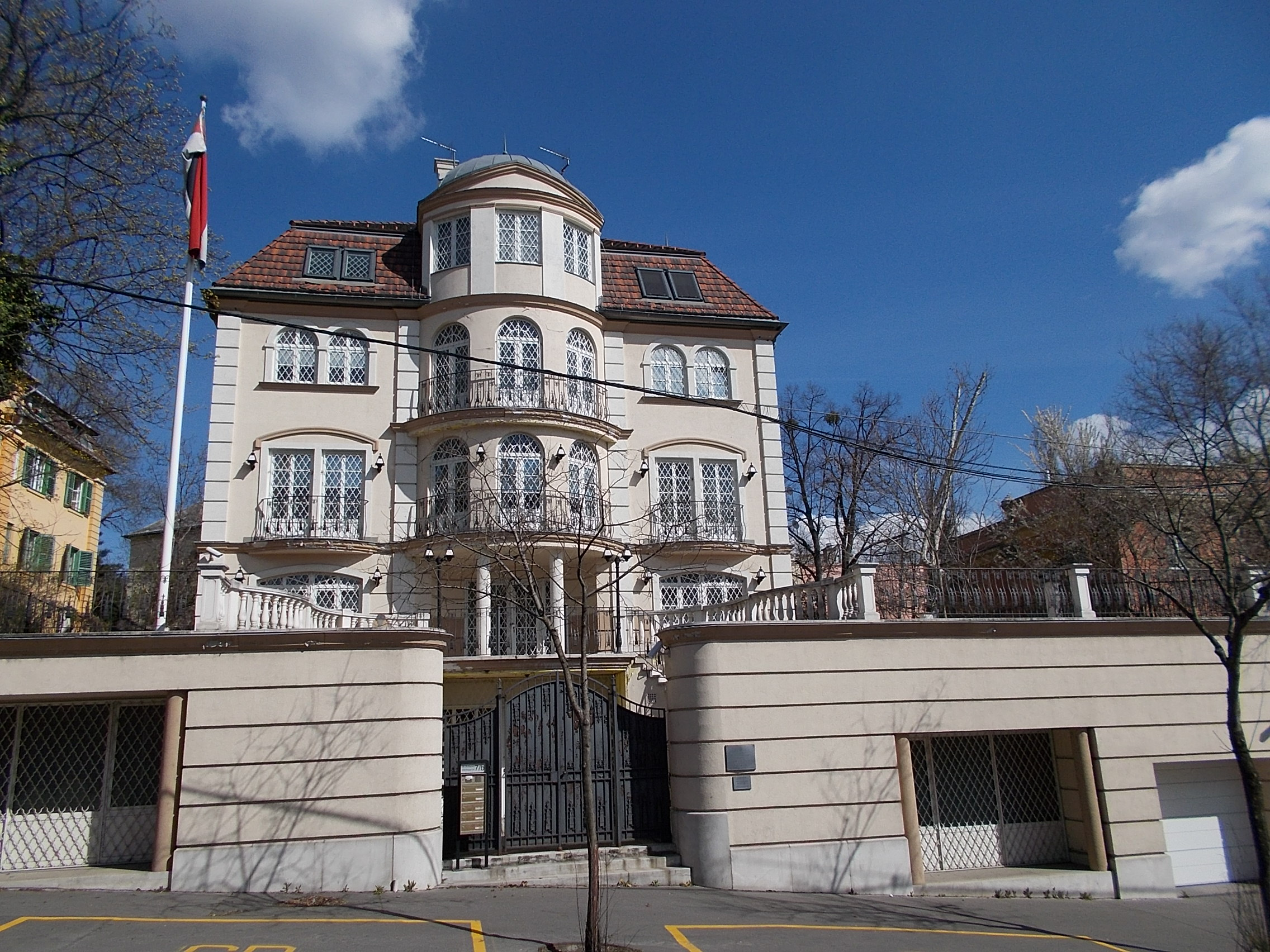 Egyiptomi Arab Köztársaság Budapesti Nagykövetségének épülete. - Budapest XII. kerület, Istenhegyi út 7/b